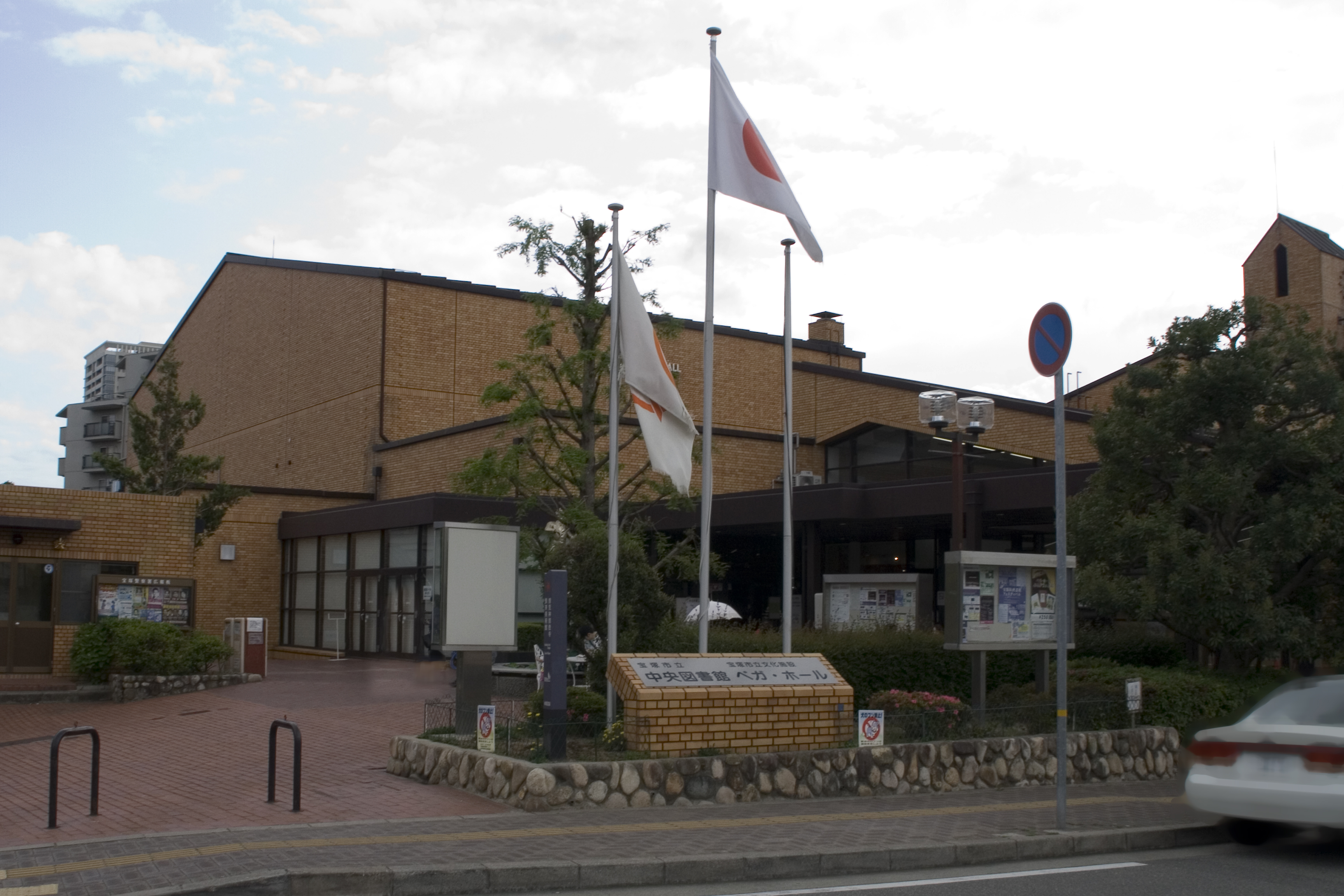 宝塚市立中央図書館